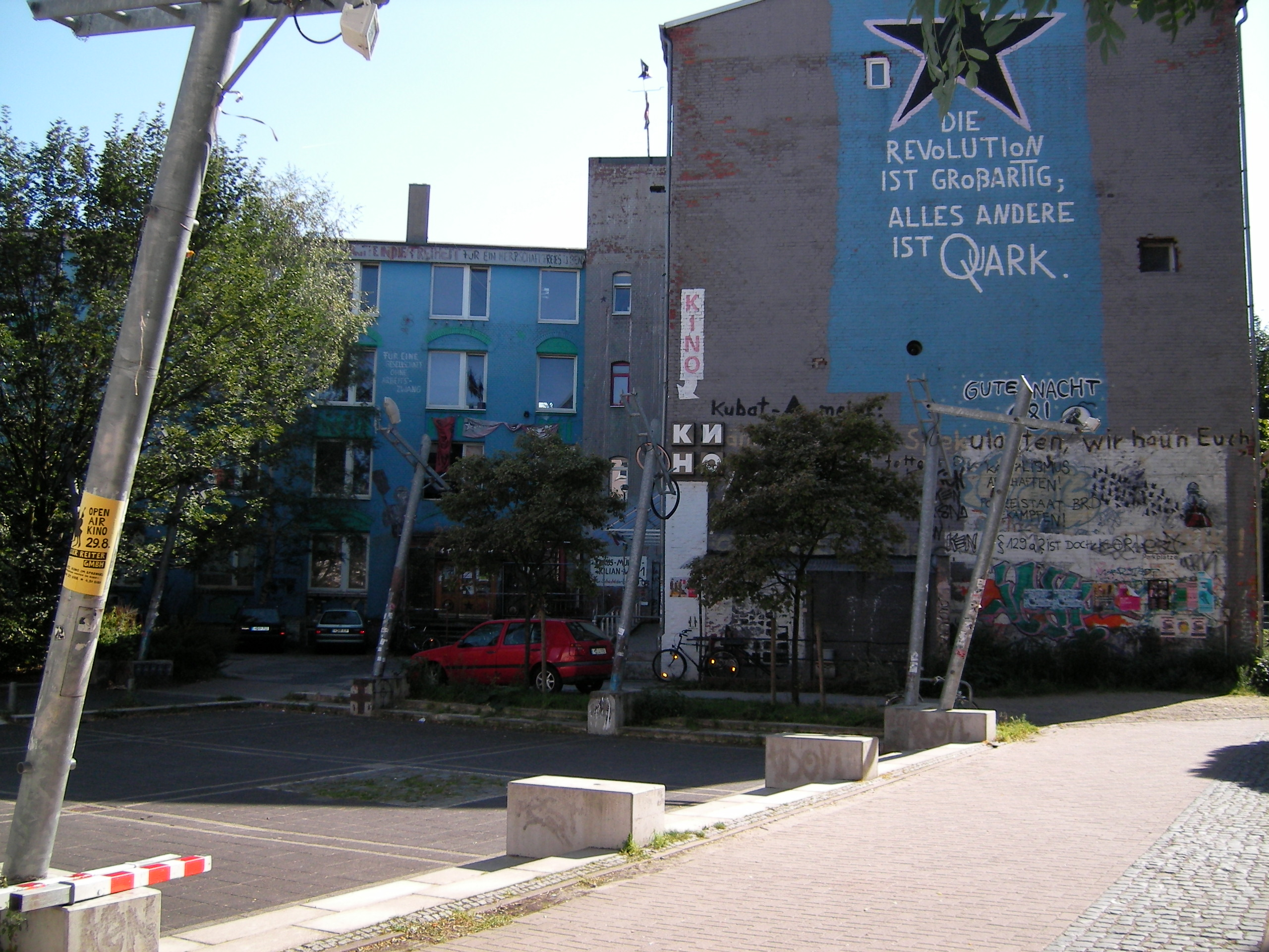 Klaus-Müller-Kilian-Weg 1 auf dem Sprengelgelände in Hannover-Nordstadt